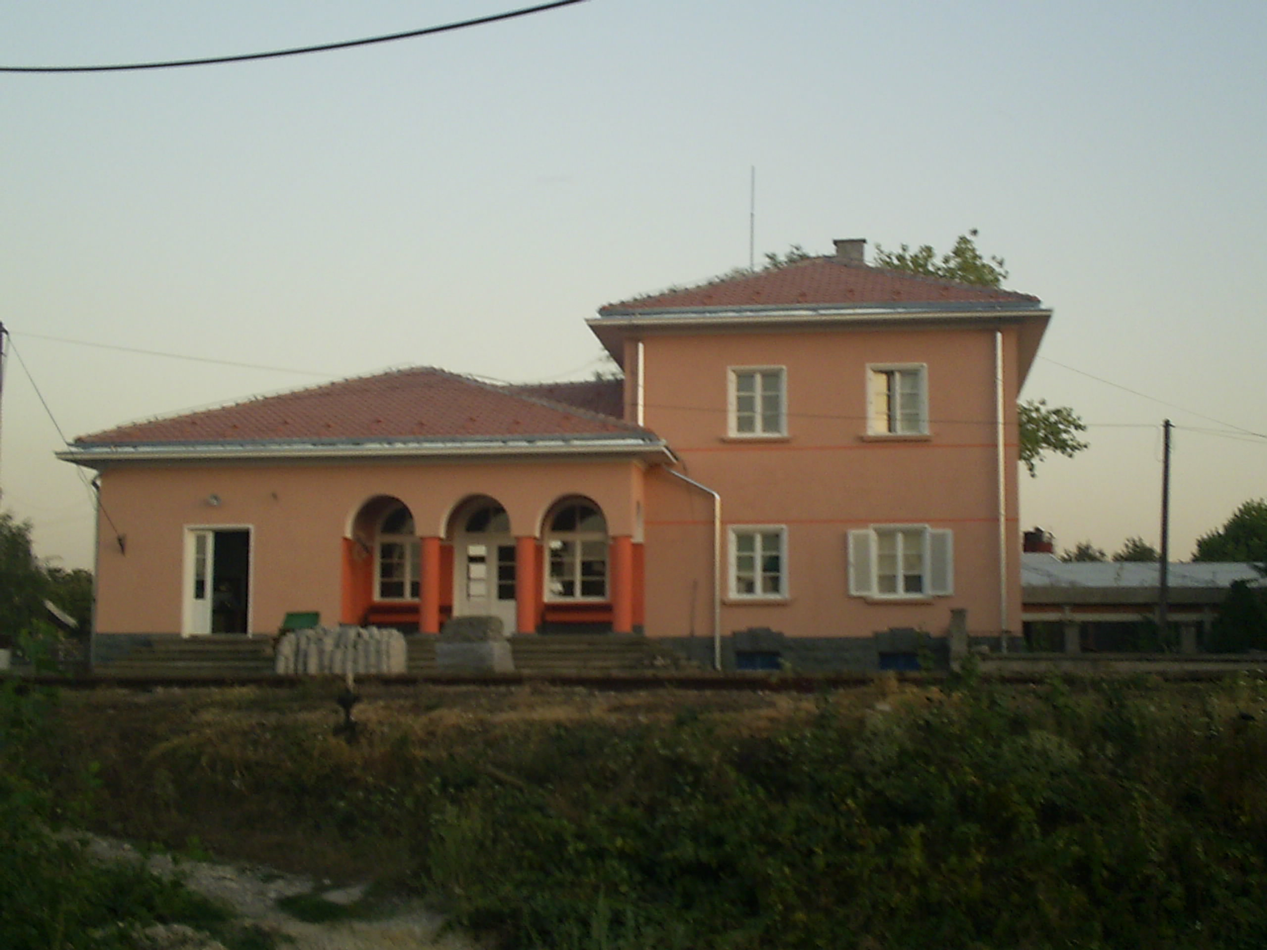 Железничка станица у Баточини